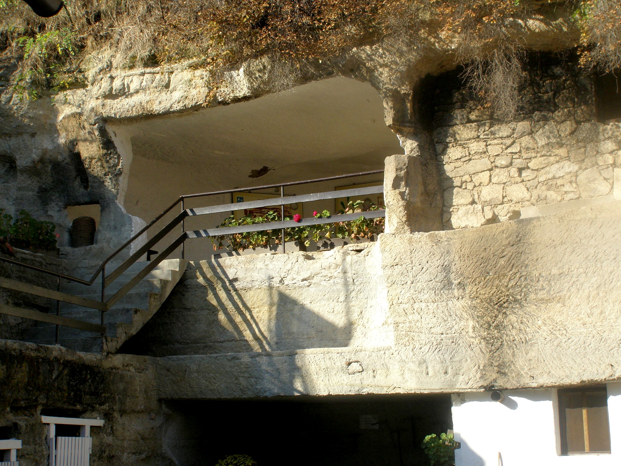 Skalné obydlia v Brhlovciach